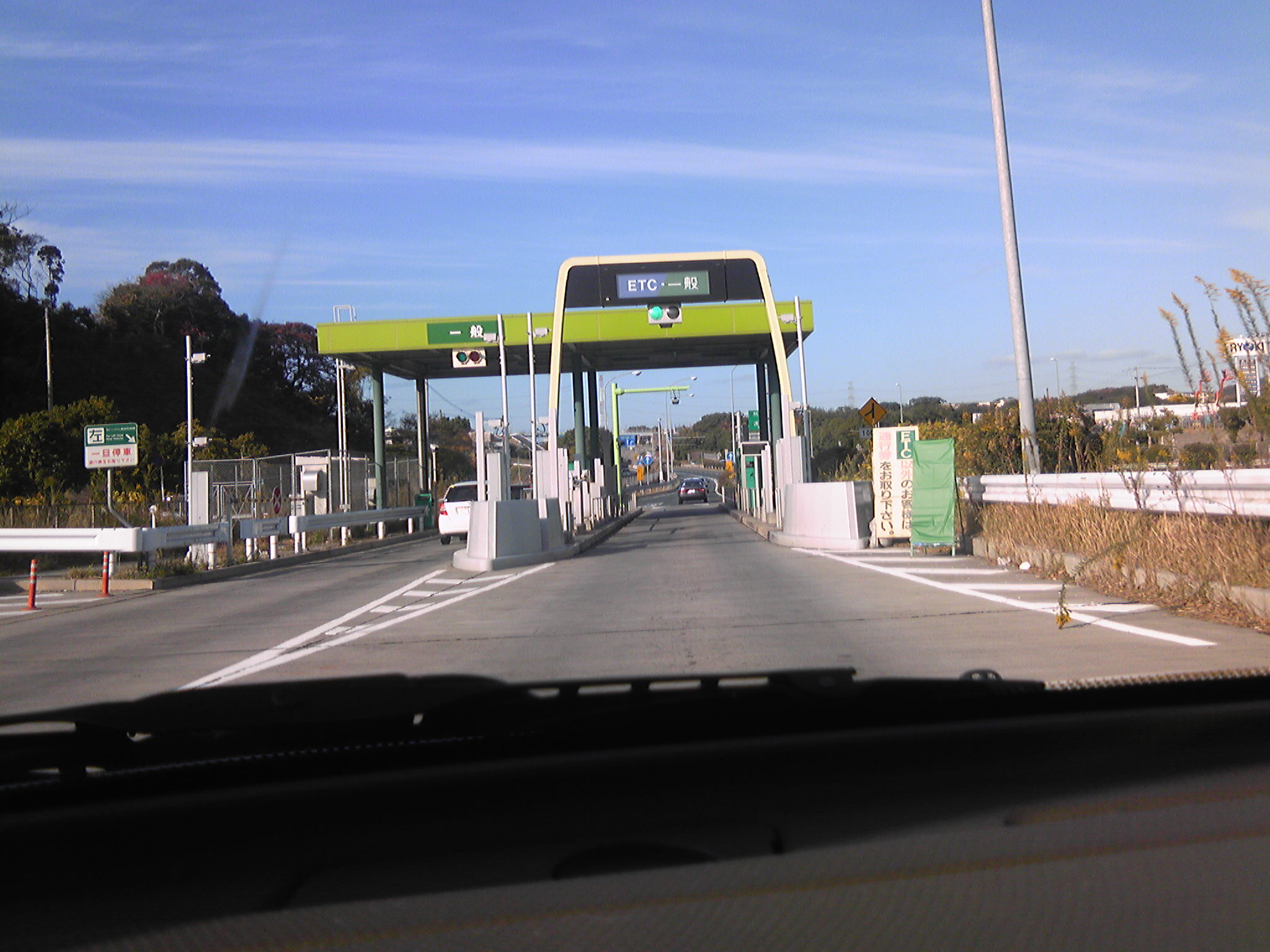 北九州高速道路 金剛入口（北九州市八幡西区）